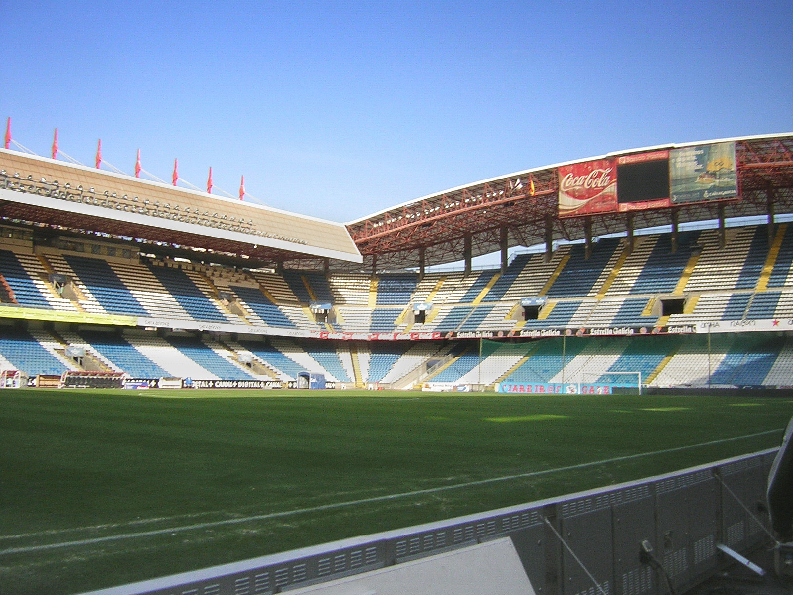 Fotografía tomada dende o interior do Estadio de Riazor.